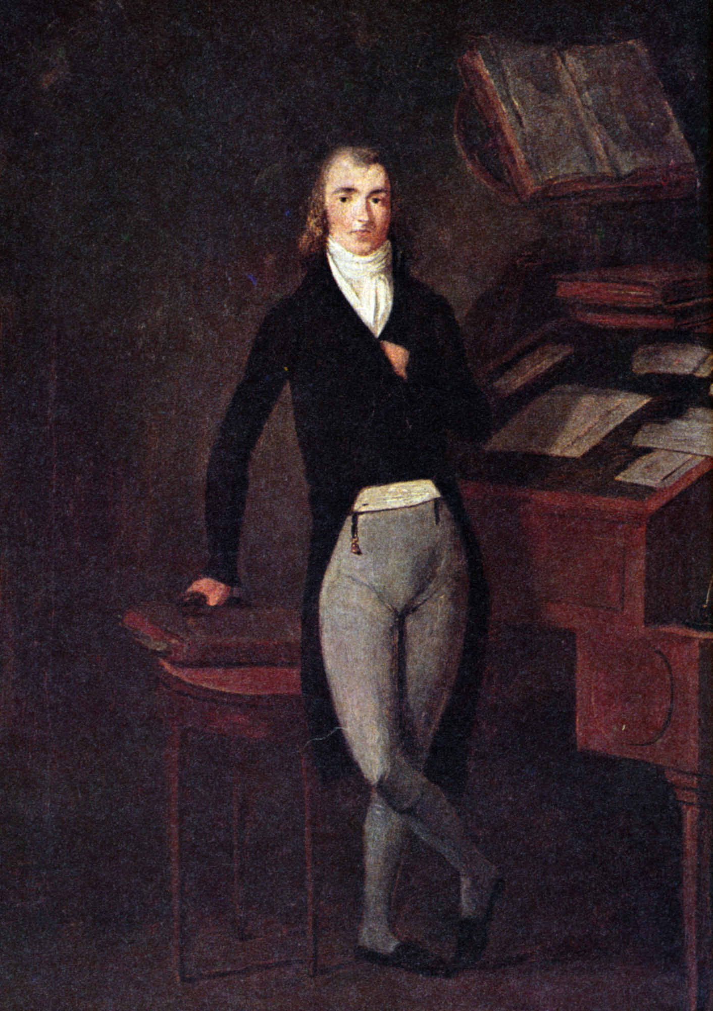 Johann Friedrich Deinhard (1772–1827), reproduziert in: „Deinhard, Erbe und Auftrag“ (Kurzfassung, 2. Auflage 1969)